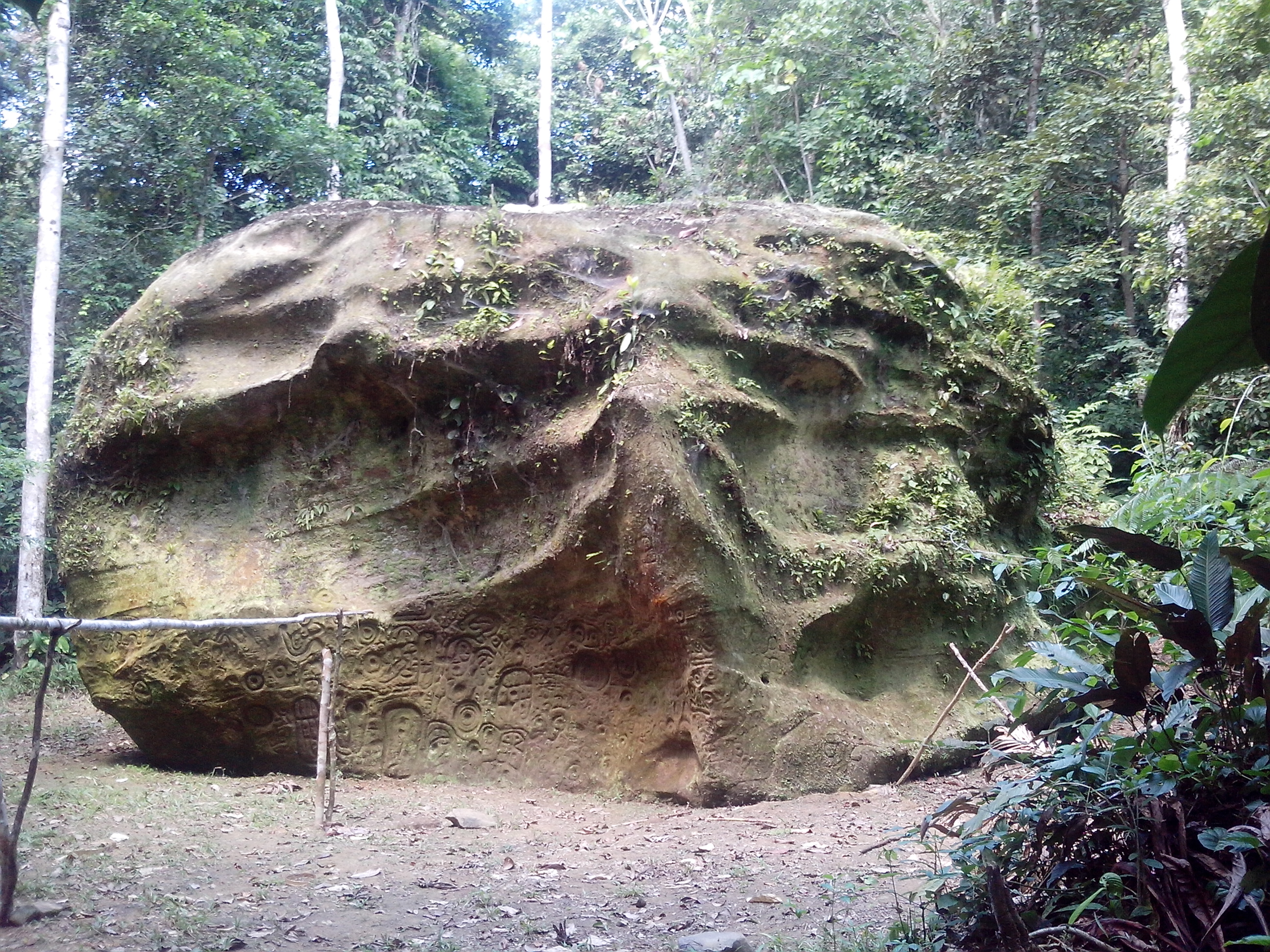 Vista de la piedra enigmática